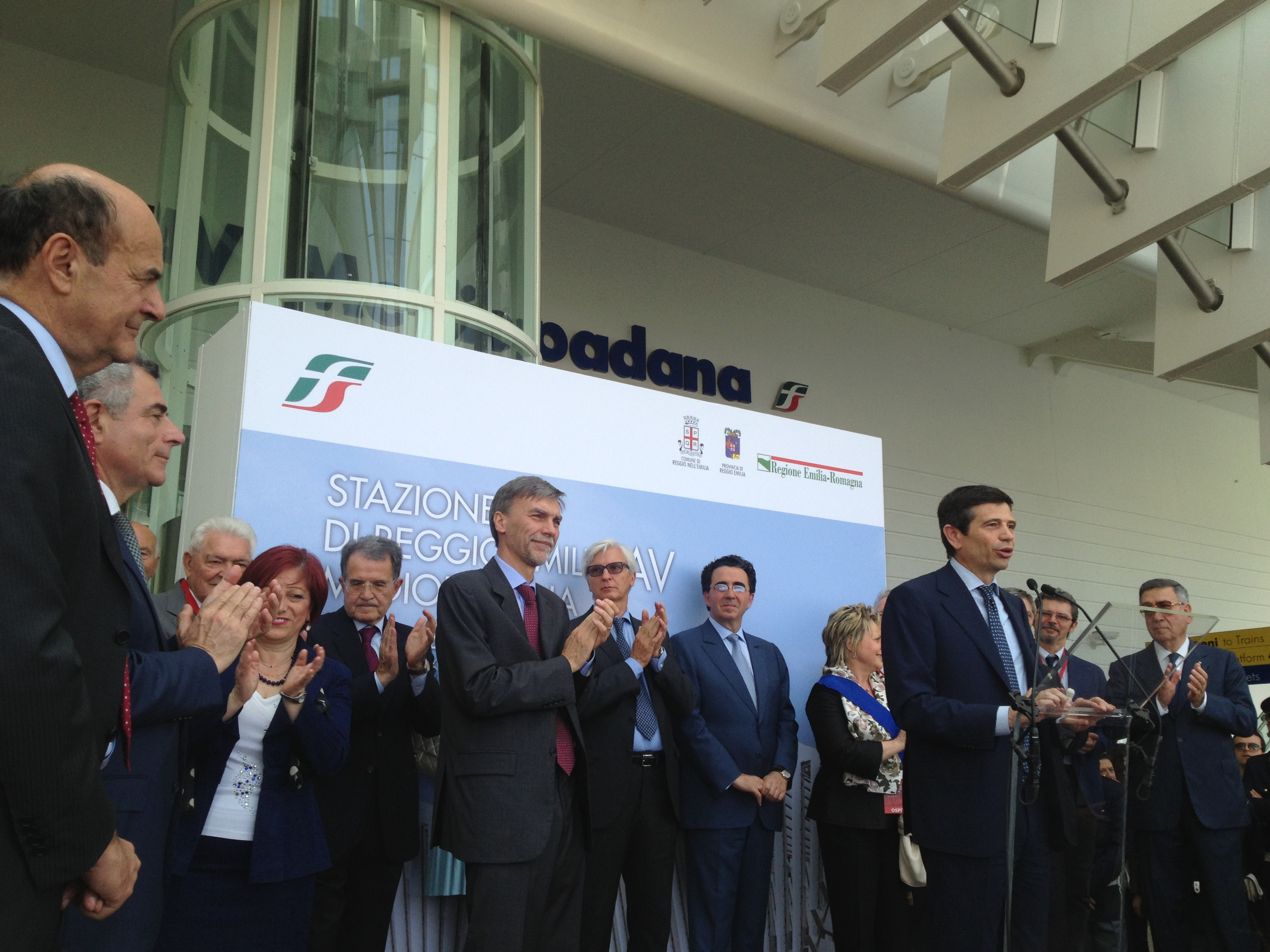 Ministro infrastrutture trasporti maurizio lupi inaugura stazione tav reggio emilia